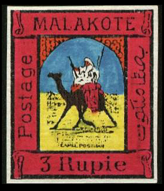 "Марка" виртуального государства Малакота